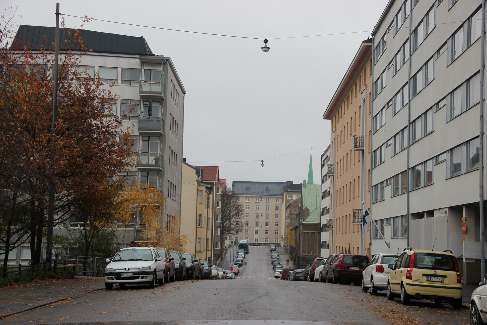 Alppikatu, Kallio, Helsinki